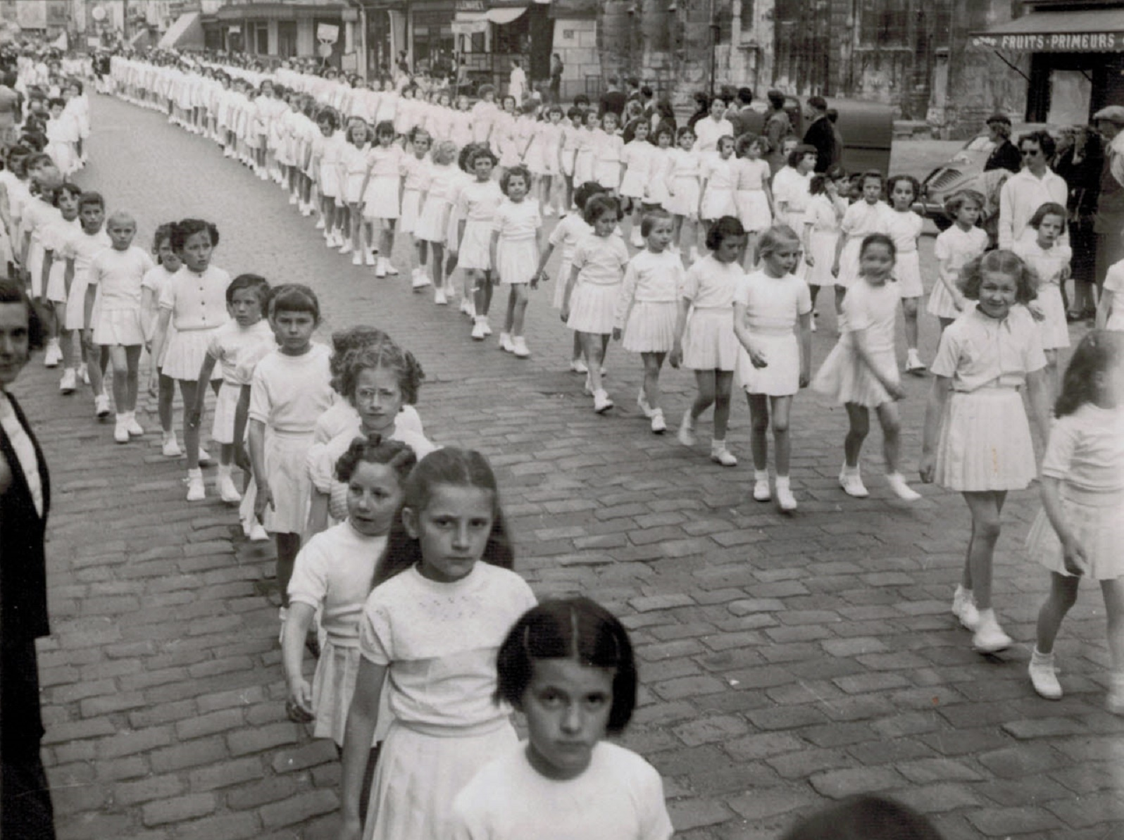 Fête de la Jeunesse des Ecoles publiques - Défilé des enfants du primaire à Pont-Audemer